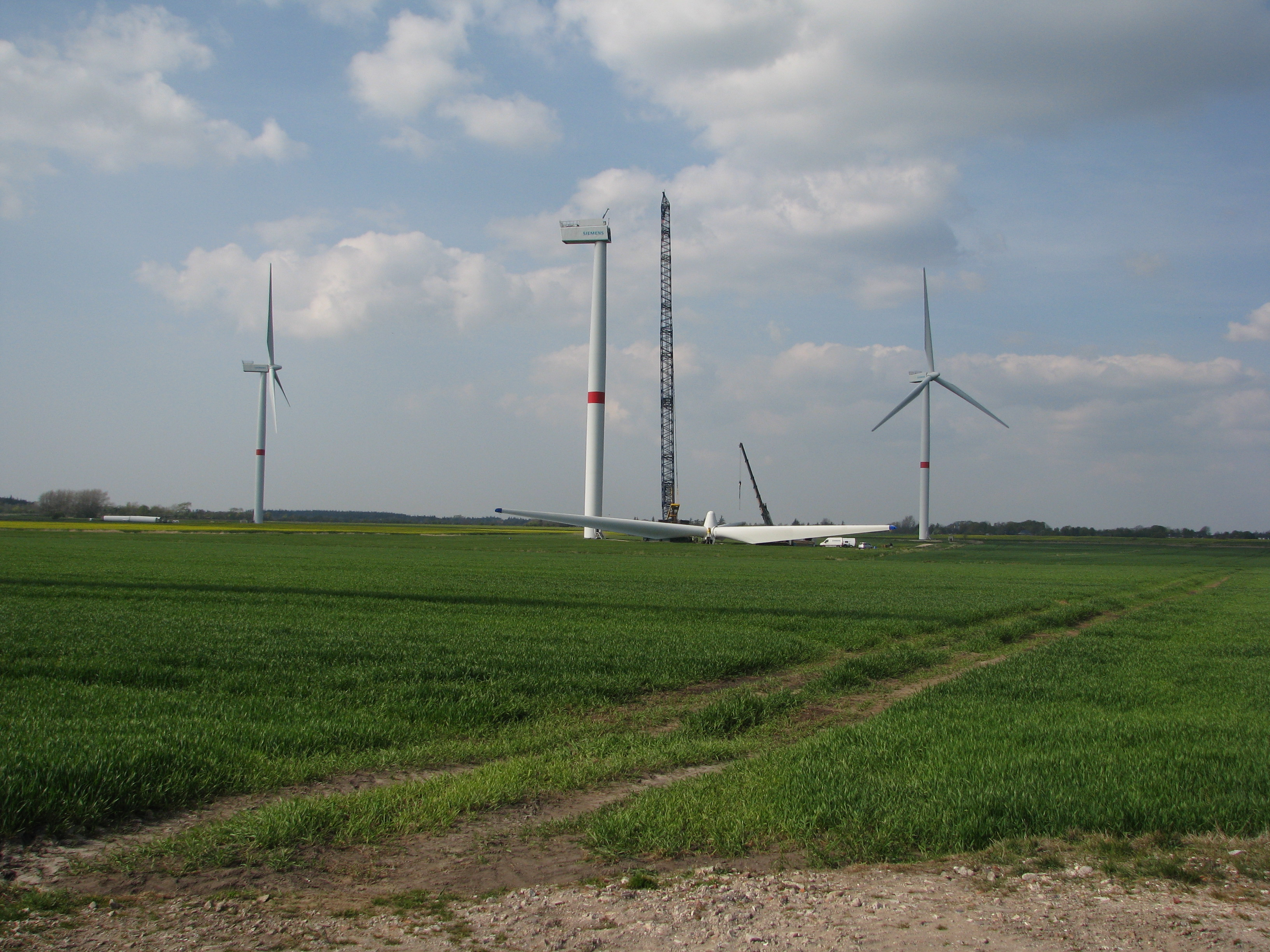 Siemens Windenergieanlagen im Bürgerwindpark Braderup bei Niebüll im Grenzbereich zu Nachbarkommune Bosbüll